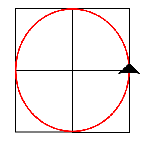 zirkuläre Polarisation